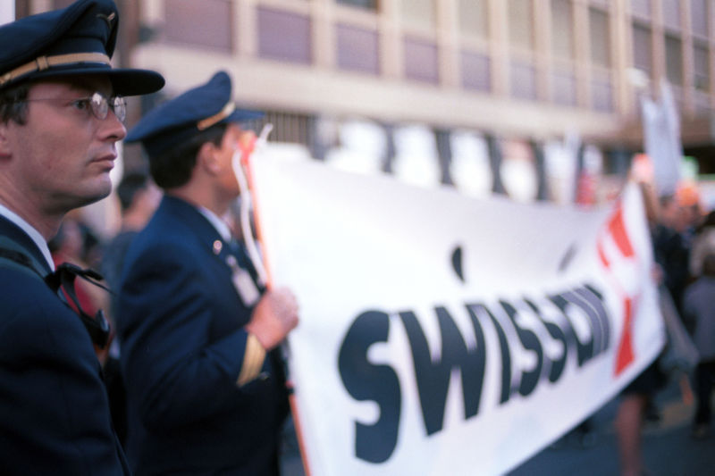 Manifestation des employé-e-s de Swissair à Genève, le 4 octobre 2001. Photo by User:ork.ch [1] Discussion Utilisateur:ork.ch (Genève)